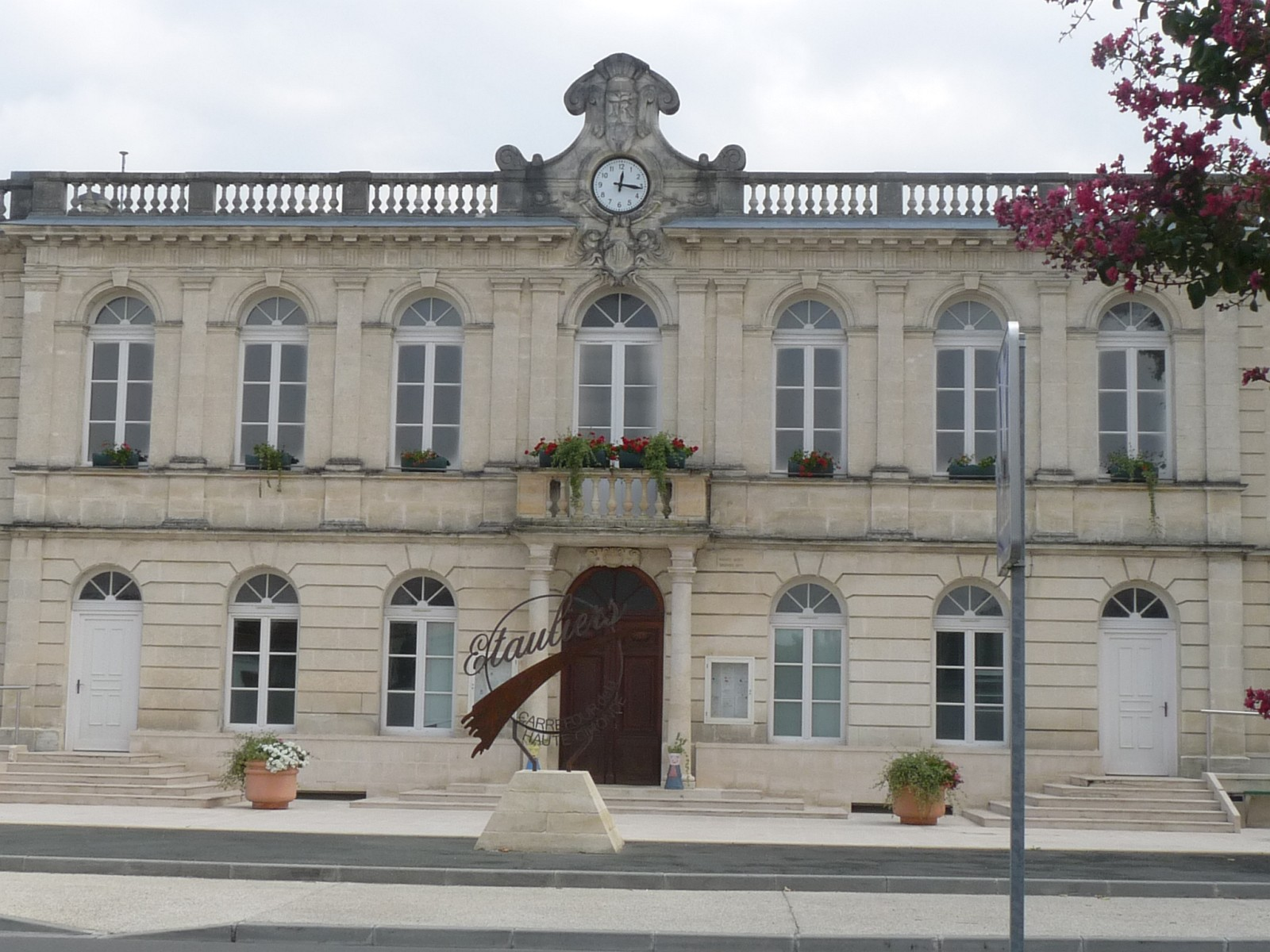 Hôtel de ville, Étauliers,Gironde, France